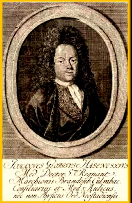 Porträt des Arztes Johann Georg Hasenest